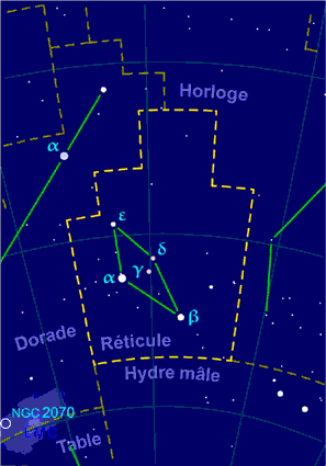 Carte pour la constellation Réticule Produite à l'aide du logiciel PP3